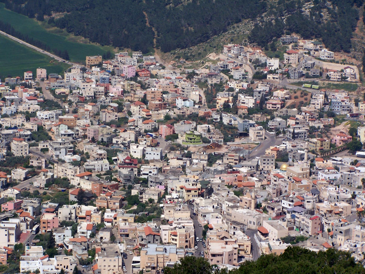 Россыпи арабских кварталов